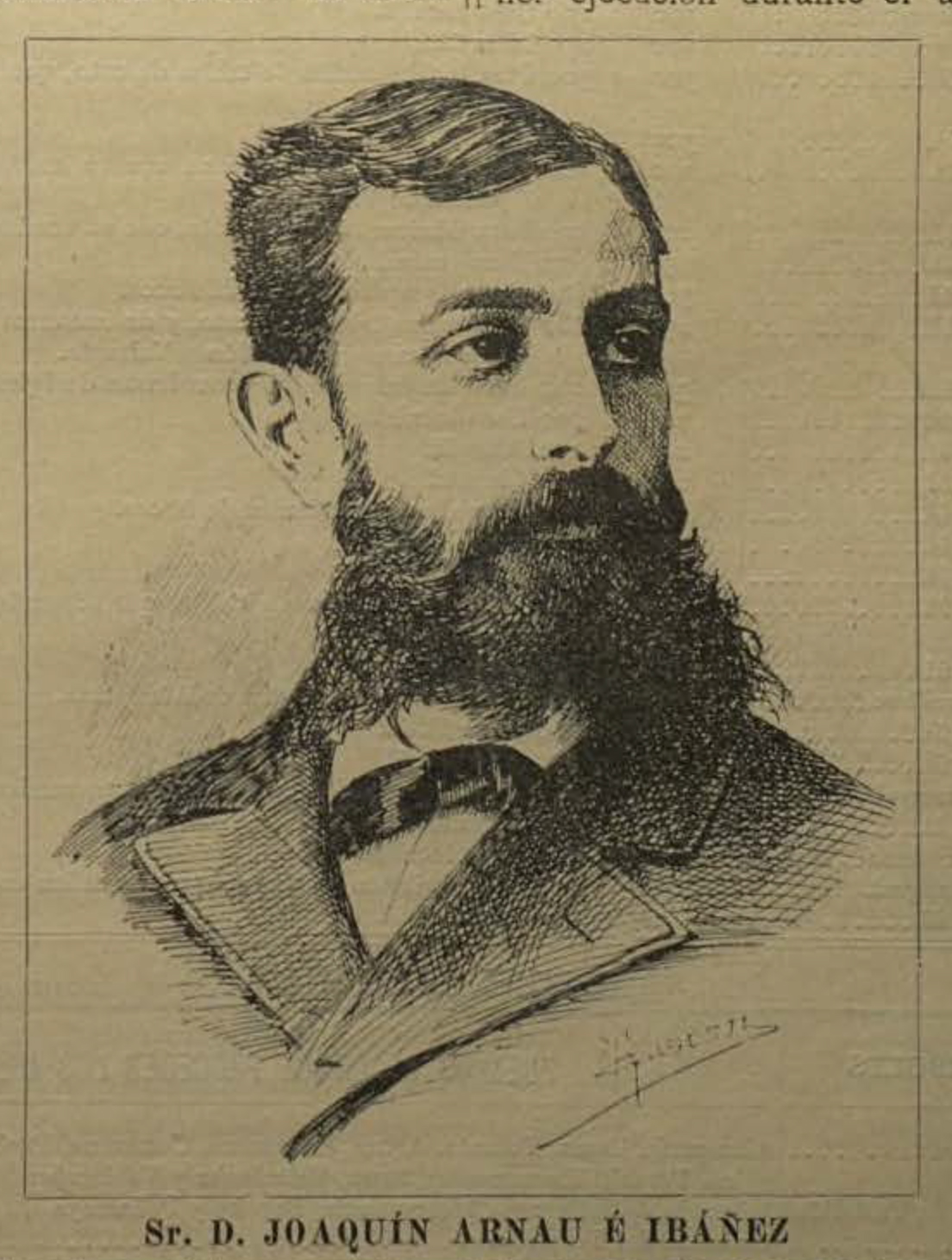 Joaquín Arnau é Ibáñez.